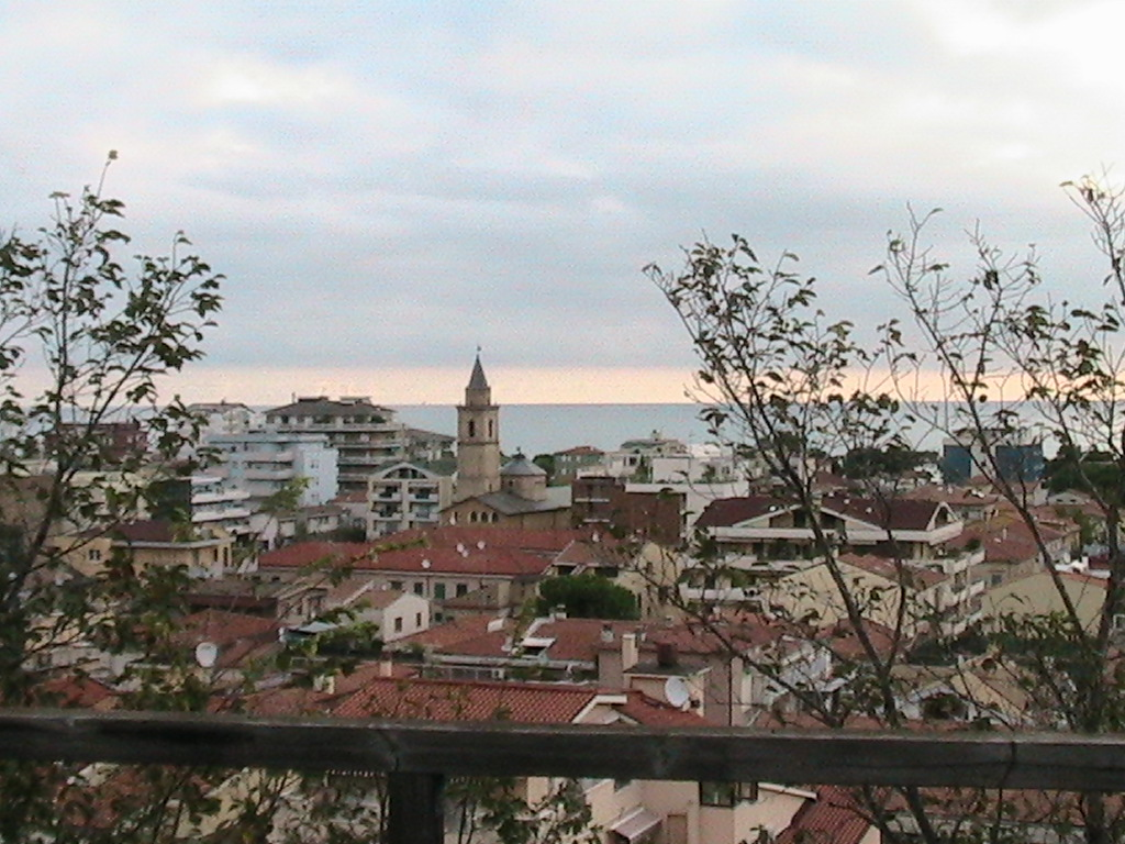 Panorama dalla collina